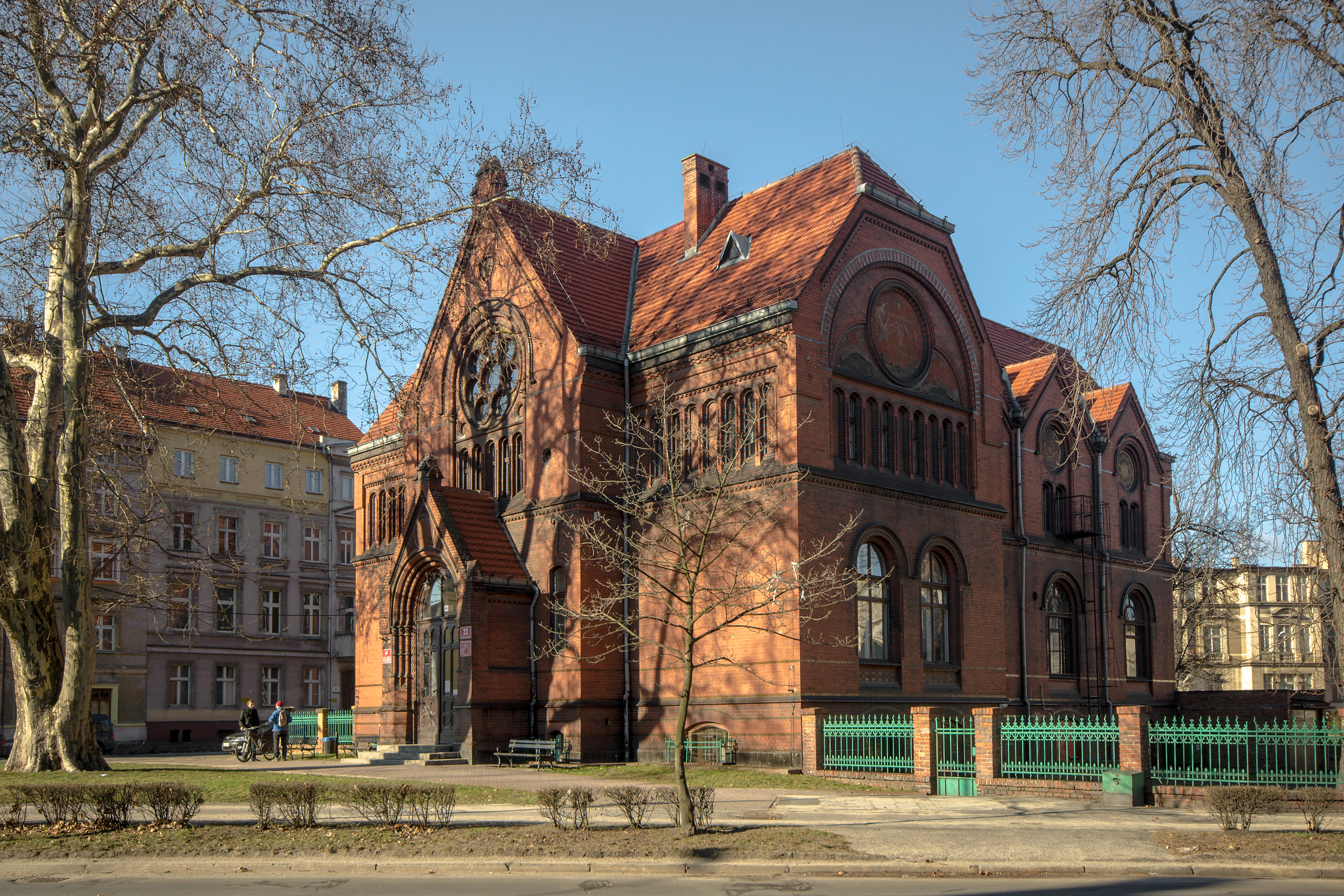 Legnica, loża masońska, 1894